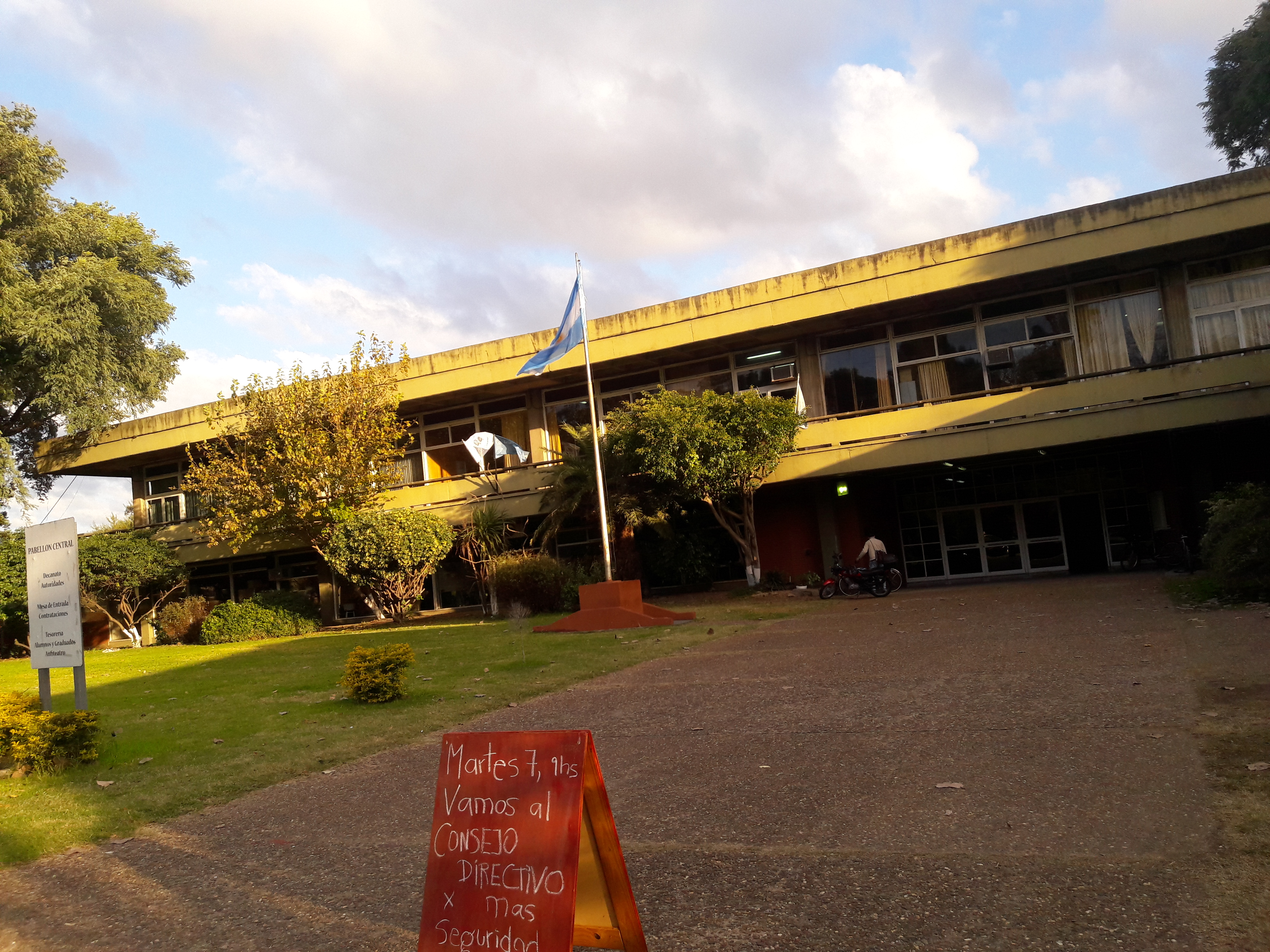 En una tarde otoñal